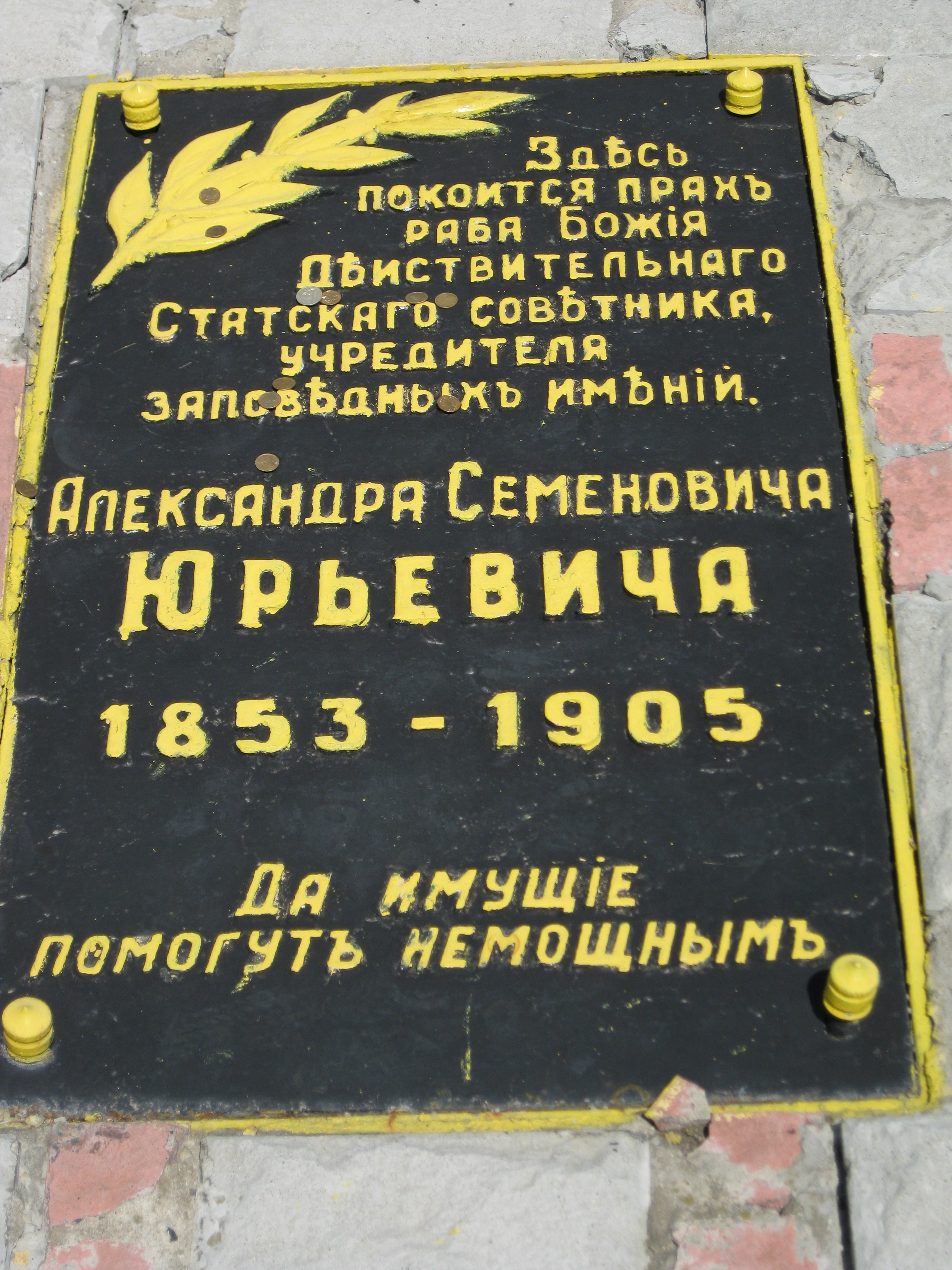 Надпись на надгробной плите А.С. Юрьевича